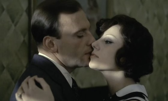 Screenshot del film Il conformista (1970) di Bernardo Bertolucci.